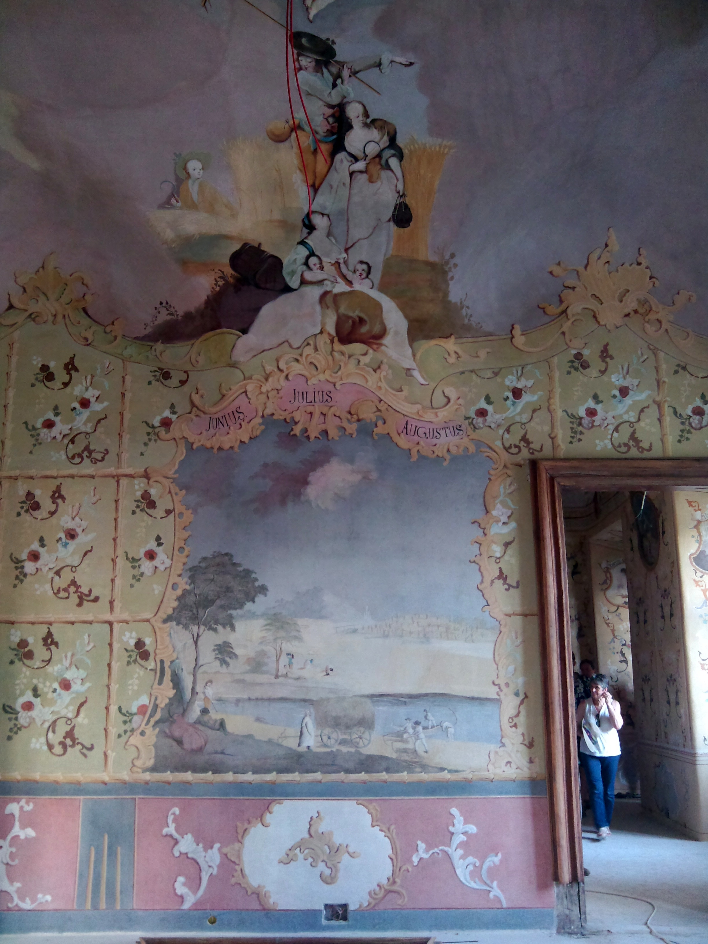 L’Huillier-Coburg-kastély freskói This is a photo of a monument in Hungary. Identifier: 2726